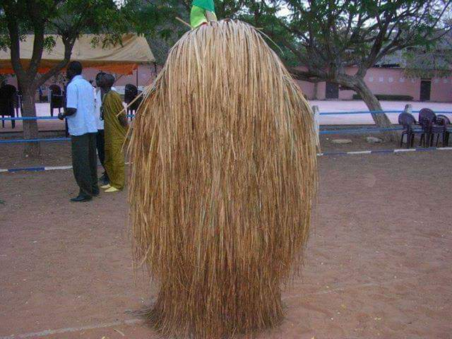 A la fin d'une circoncision, on organise une grande cérémonie au village pour marquer la fin